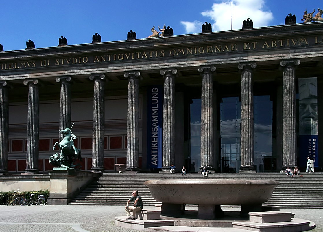 Altes Museum in Berlin/Deutschland; Granitschale und Vorhalle mit ionischen Säulen